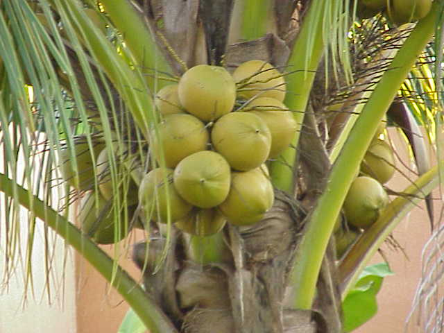 Species: Cocos nucifera Family: Arecaceae Image No. 15